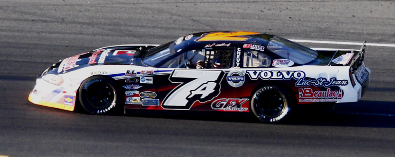 Karl Allard en Série PASS North - Autodrome Chaudière - 18 mai 2013 - Photo Paul-Émile Poulin-Jacques